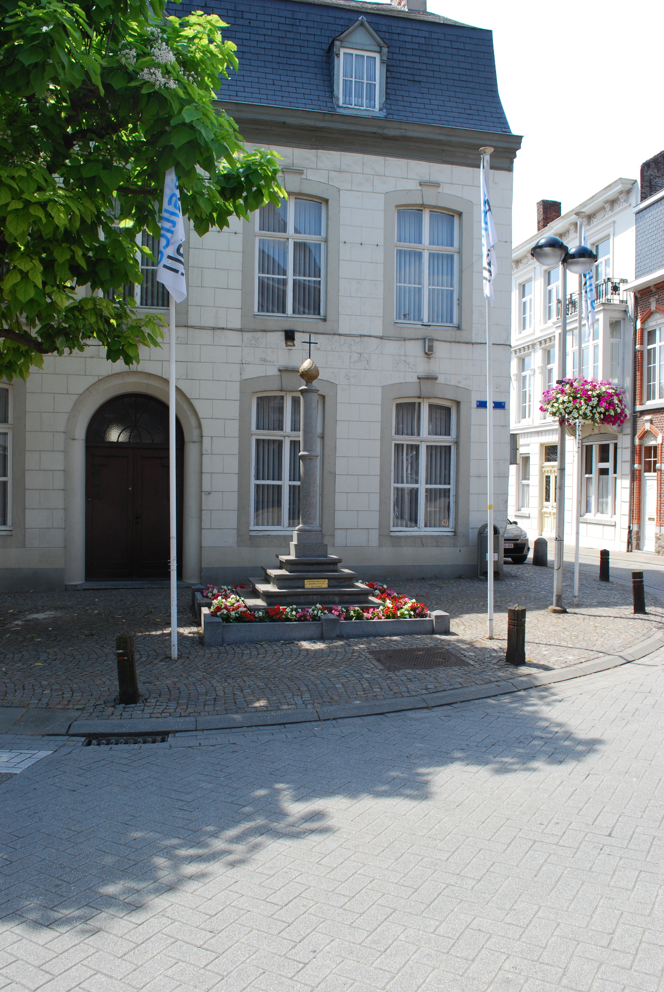 Le Perron de Tongres.